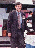 Marcos Castilho - Personal Archive